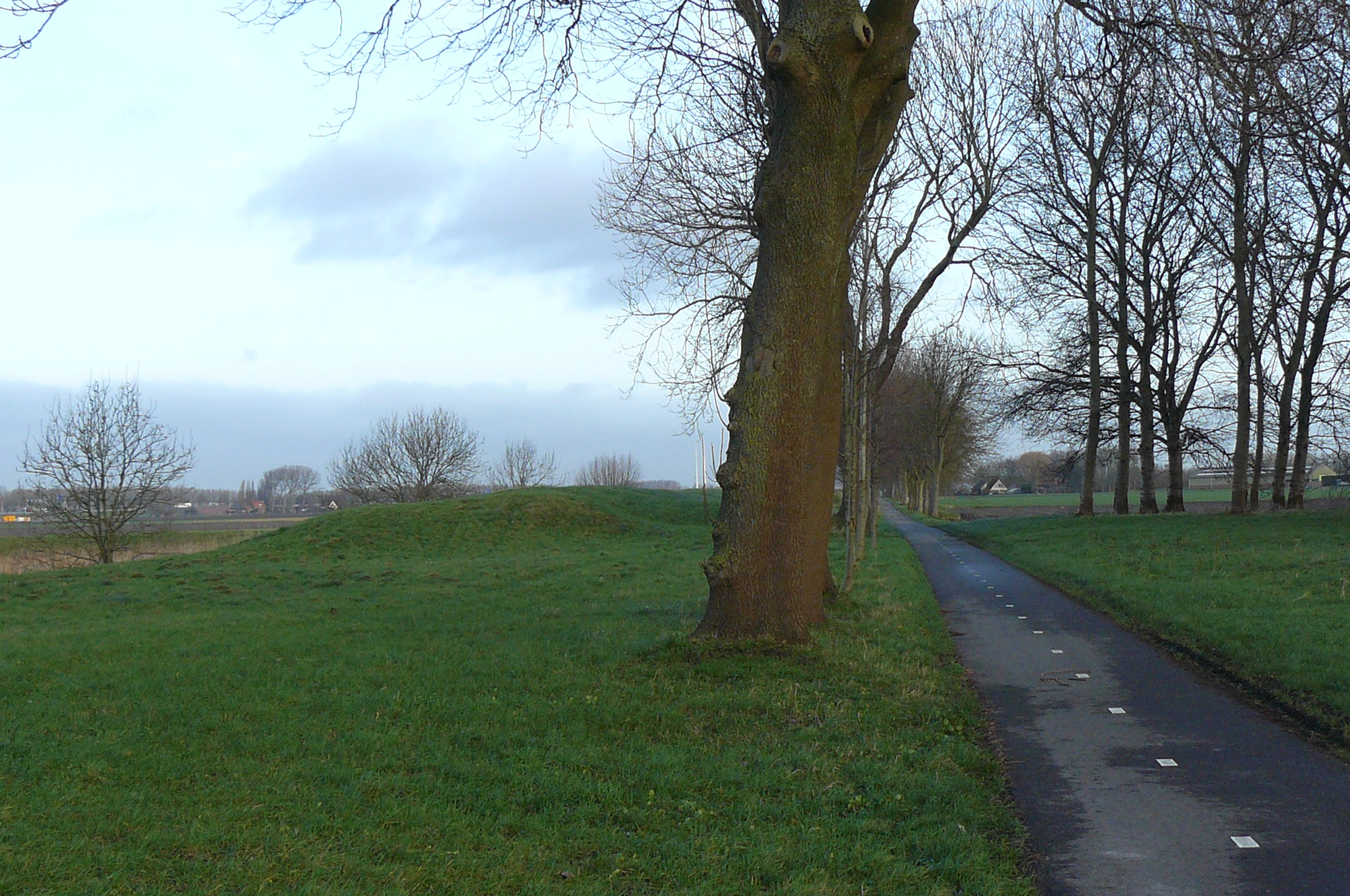 Tussen de forten Zuidwijkermeer en Aagtendijk ligt een 2,5 kilometer lange liniewal. Hier begint de wal bij Fort Zuidwijkermeer. Rechts van de wal, nu een fietspad, lag een weg waarover troepen en materieel relatief veilig verplaats kon worden. De wal is ongeveer twee meter hoog en een lopend persoon kan er net niet overheen kijken.